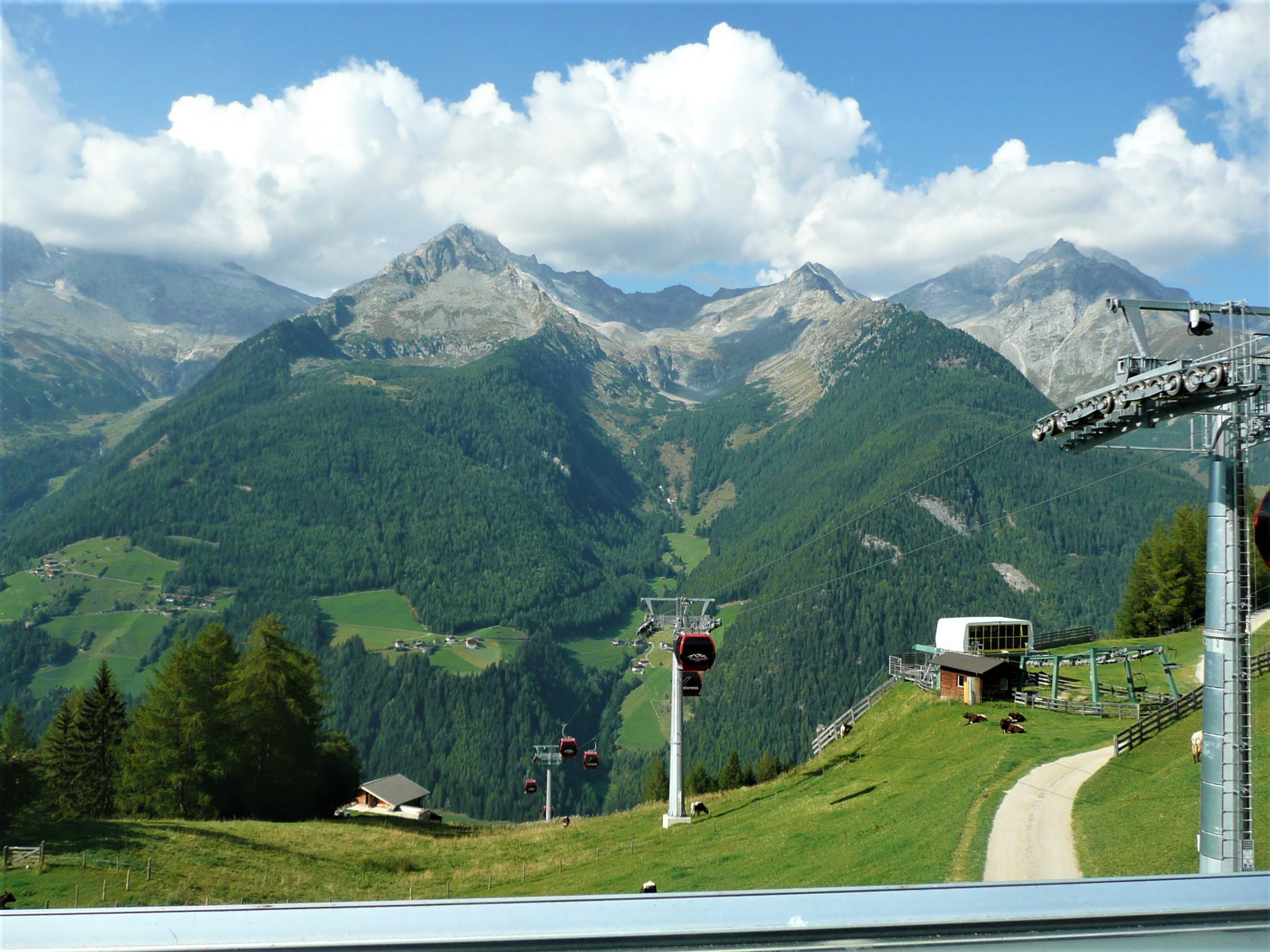 Ansicht der Zillertaler Alpen von der Bergstation Klausberg aus